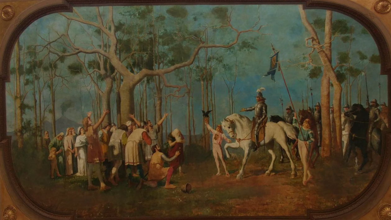 Omaggio del popolo a Ruggero il Normannolabel QS:Lit,"Omaggio del popolo a Ruggero il Normanno"